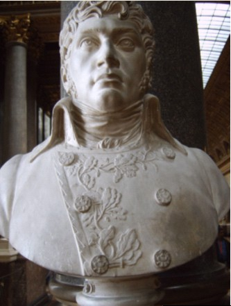 buste de Pierre Banel dans la galerie des batailles du château de Versailles